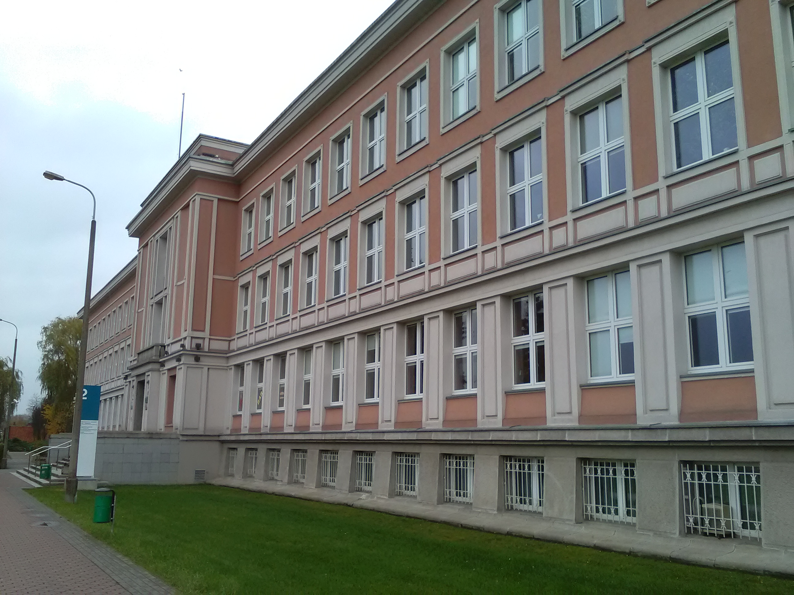 Politechnika Poznańska.